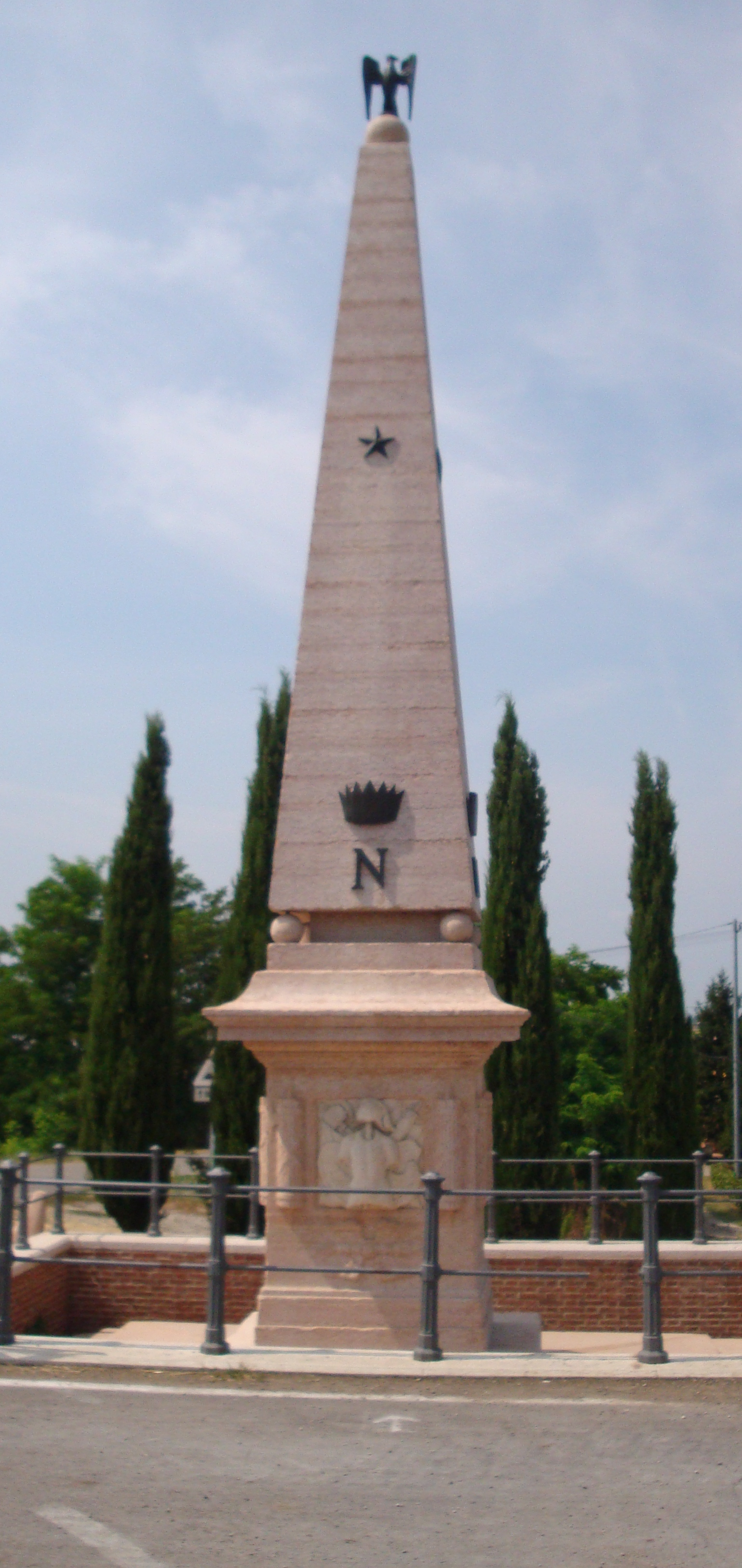 L’obélisque situé à côté du pont d'Arcole